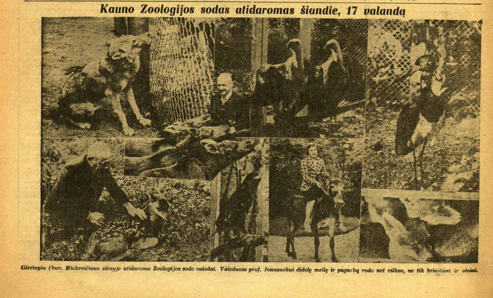 Lietuvos zoologijos sodo atidarymas // ,,Lietuvos žinios" 1938 m.